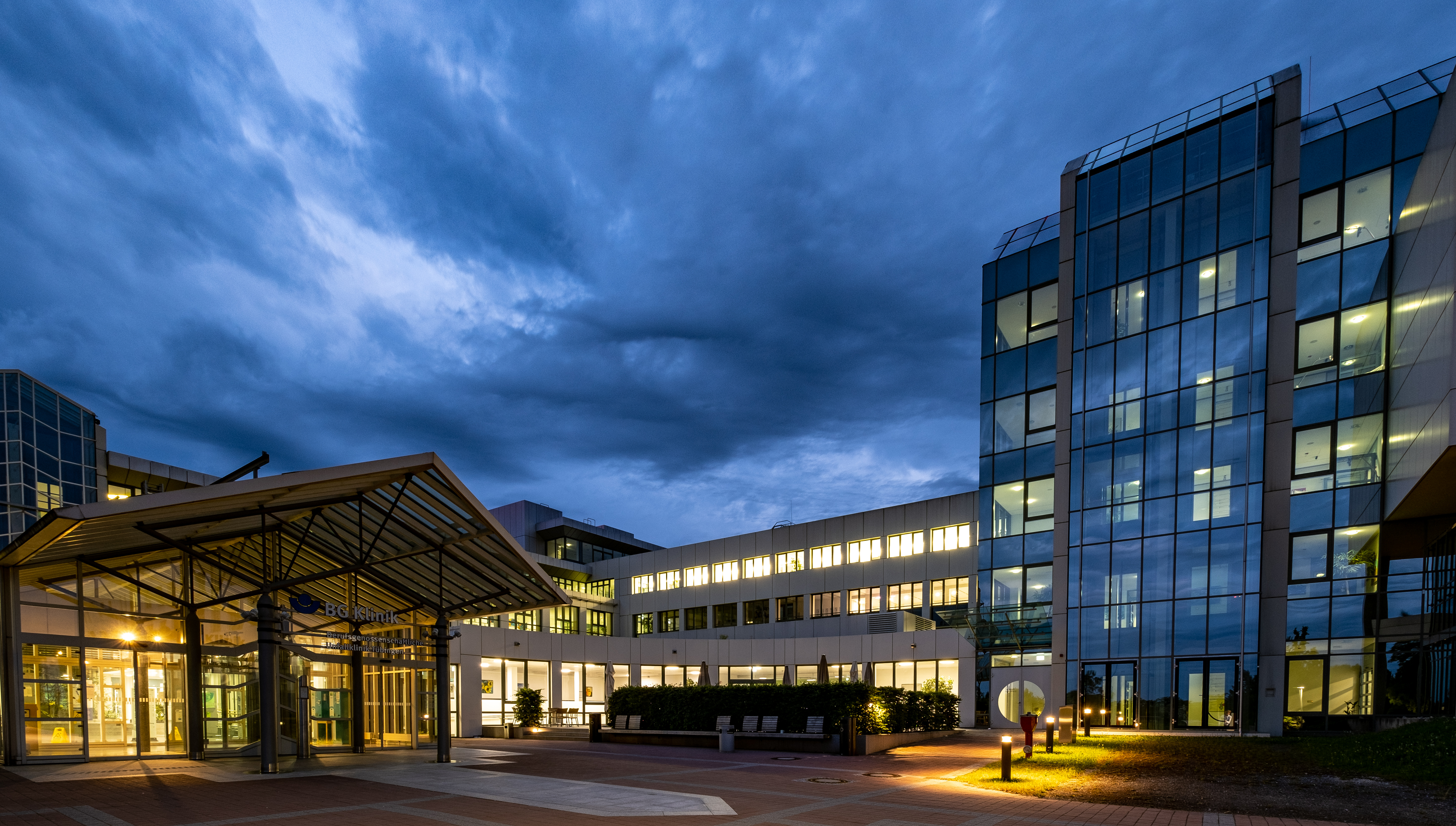 BG in Tübingen zur blauen Stunde